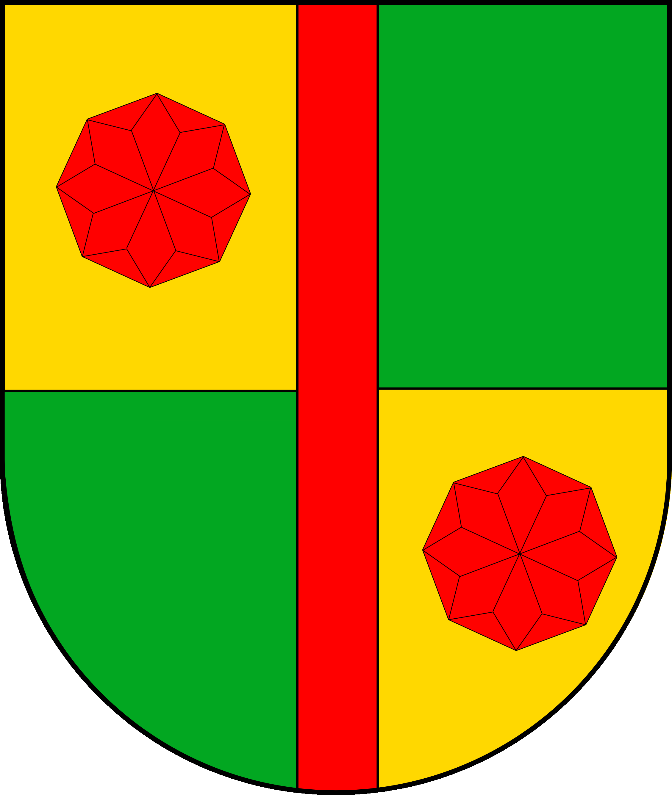 Znak obce Ratboř